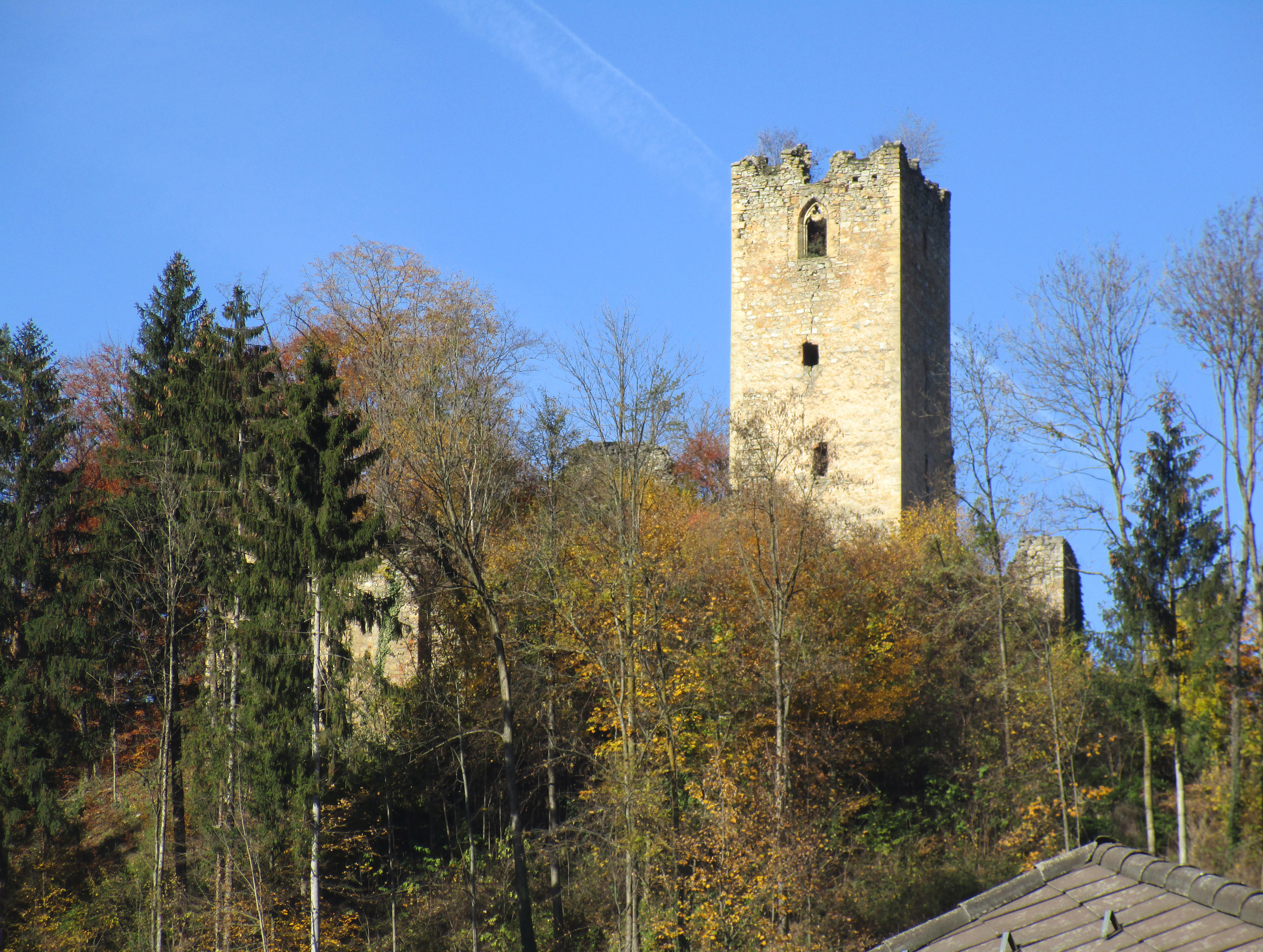 Ruine Sturmberg in der Gemeinde Naas von Südosten